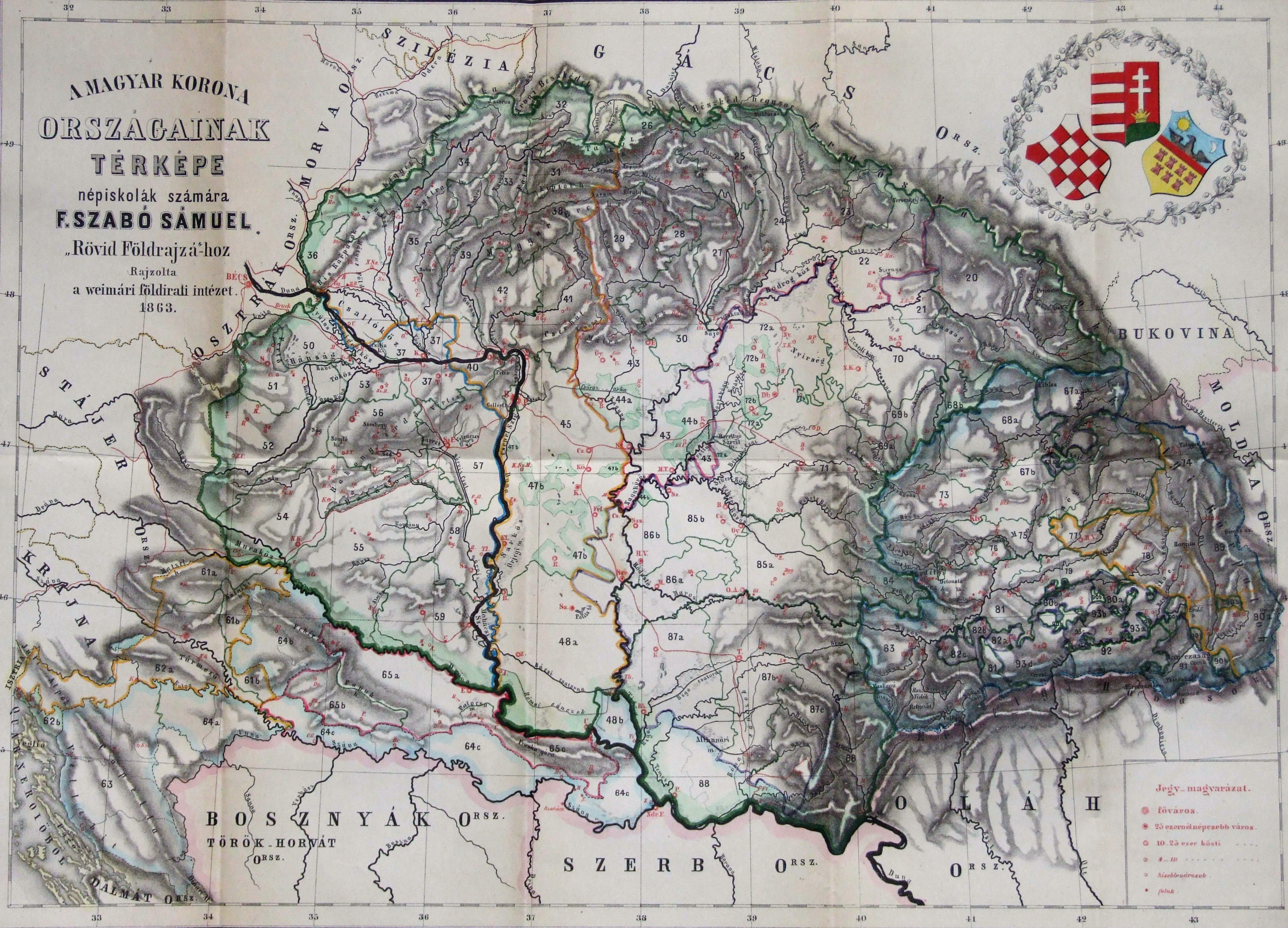 A Magyar Korona országainak térképe F. Szabó Sámuel 1863